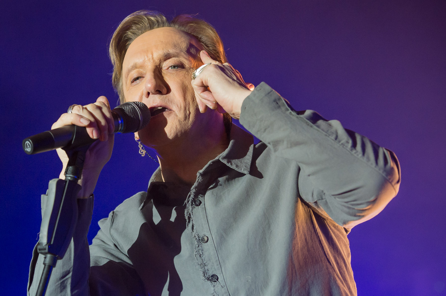 Westernhagen - Alphatier Pre-Listening Tour 2014 im Löwensaal in Nürnberg